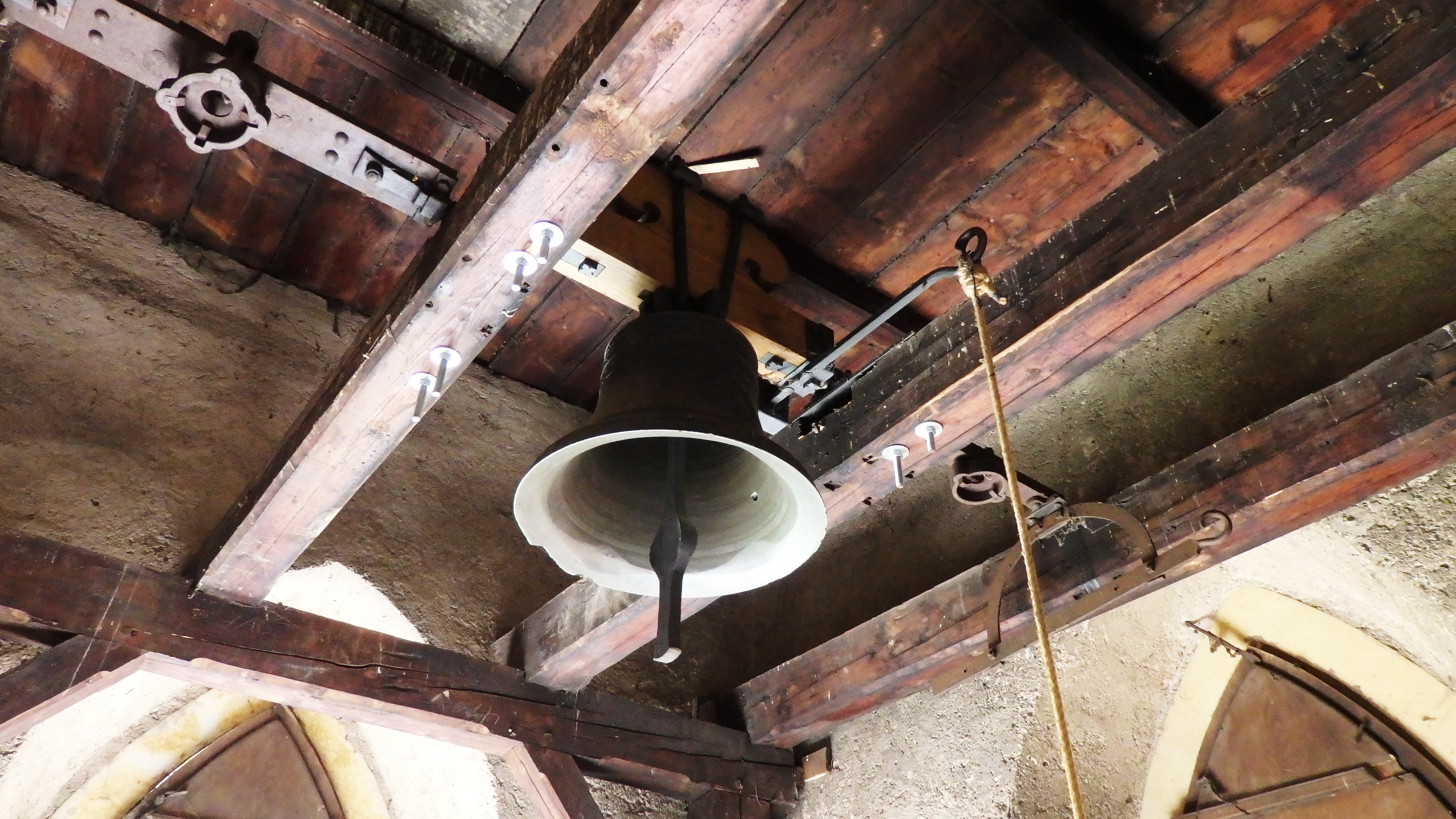 Kostel U Svatých v Domažlicích, zvon z roku 1715